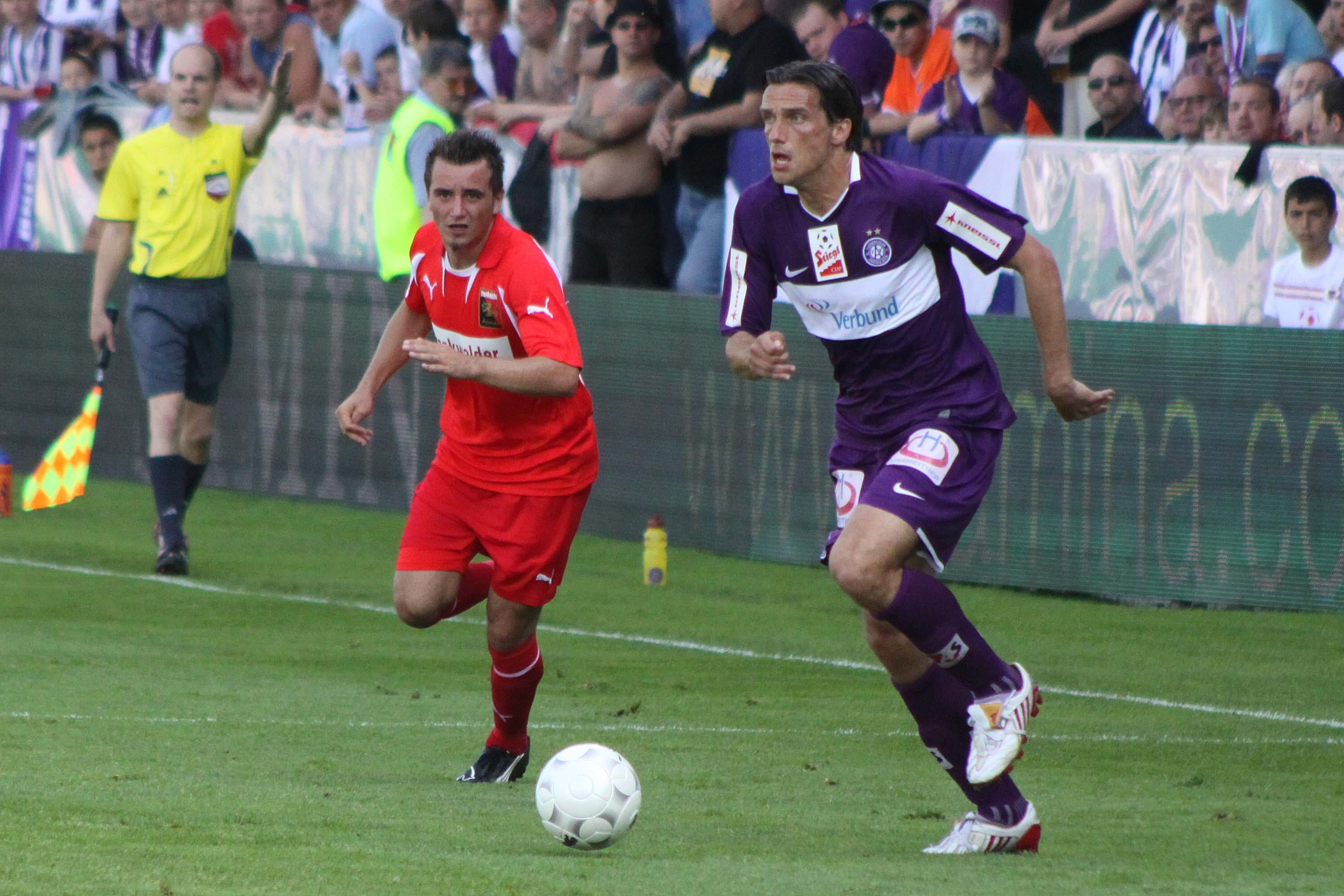 Finale im Österreichischer Fußball-Cup 2008/09 - FC Admira Wacker Mödling gegen FK Austria Wien: Austria-Doppeltorschütze Milenko Ačimovič enteilt Rene Schicker